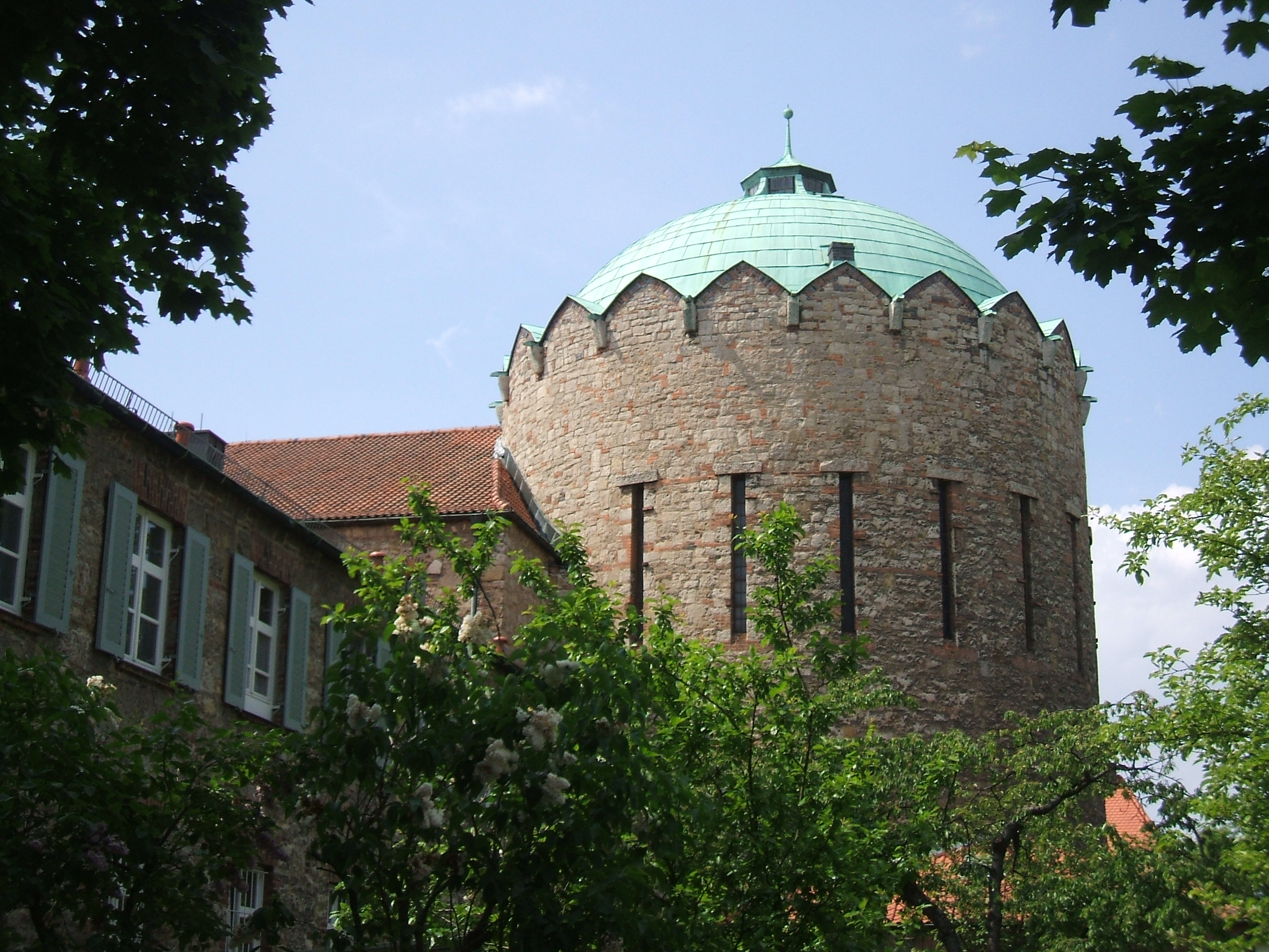 Kath. Pfarrkirche St. Heinrich Bamberg